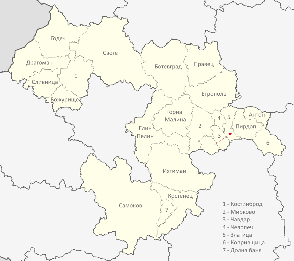 Картата е създадена от Любомир Таушанов